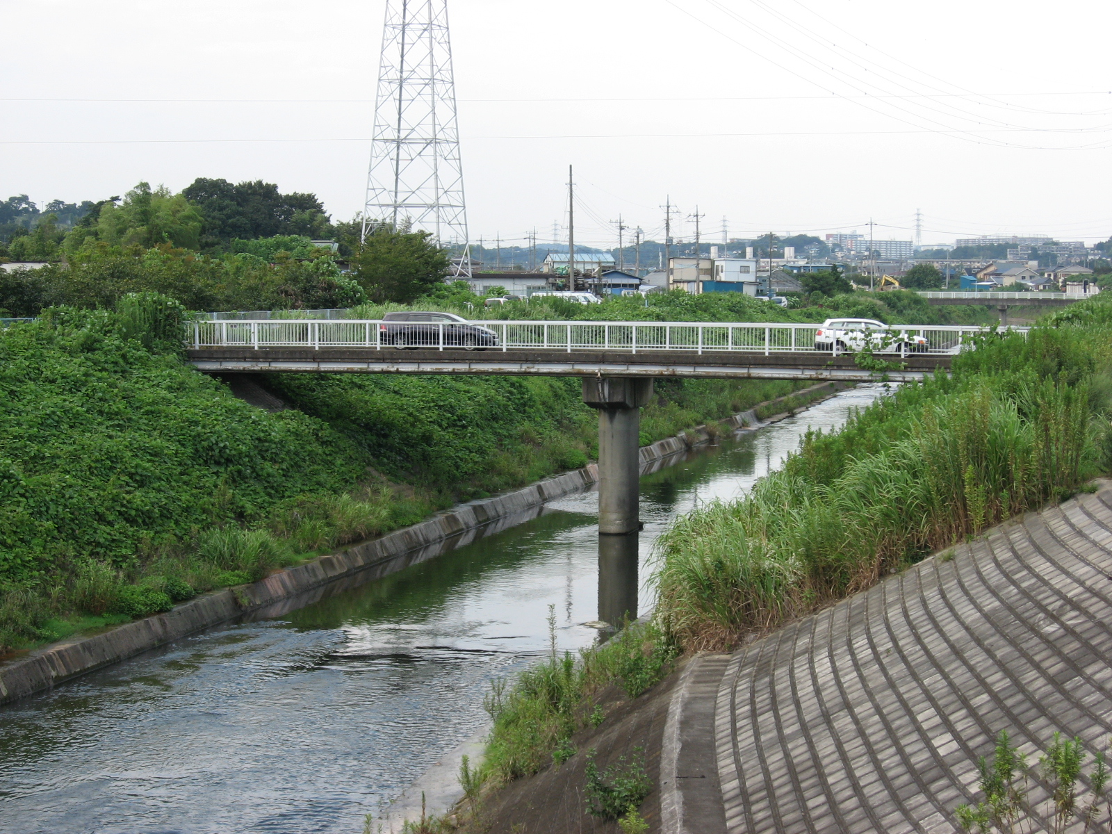 鶴見川 鴨志田橋